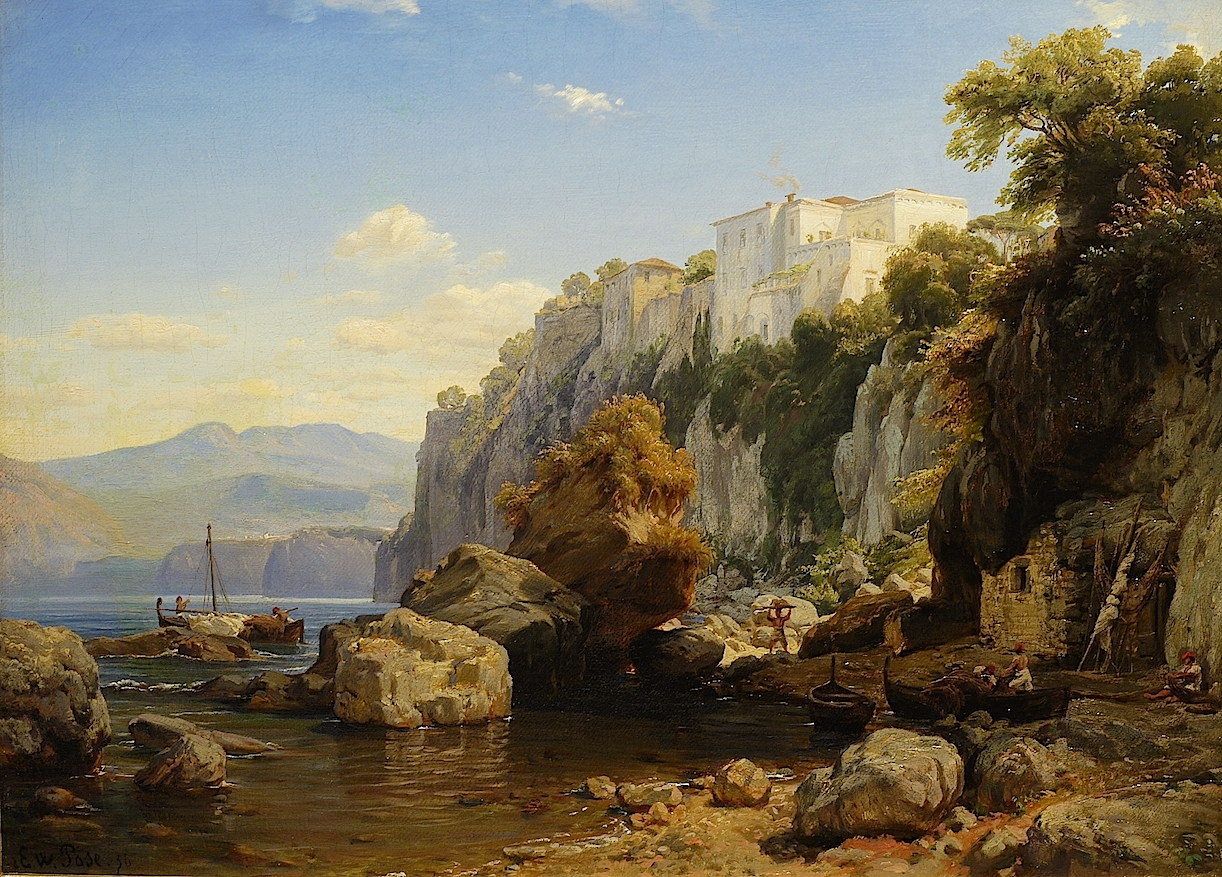 Картина Вильгельма Позе "Итальянский прибрежный ландшафт, Сорренто".